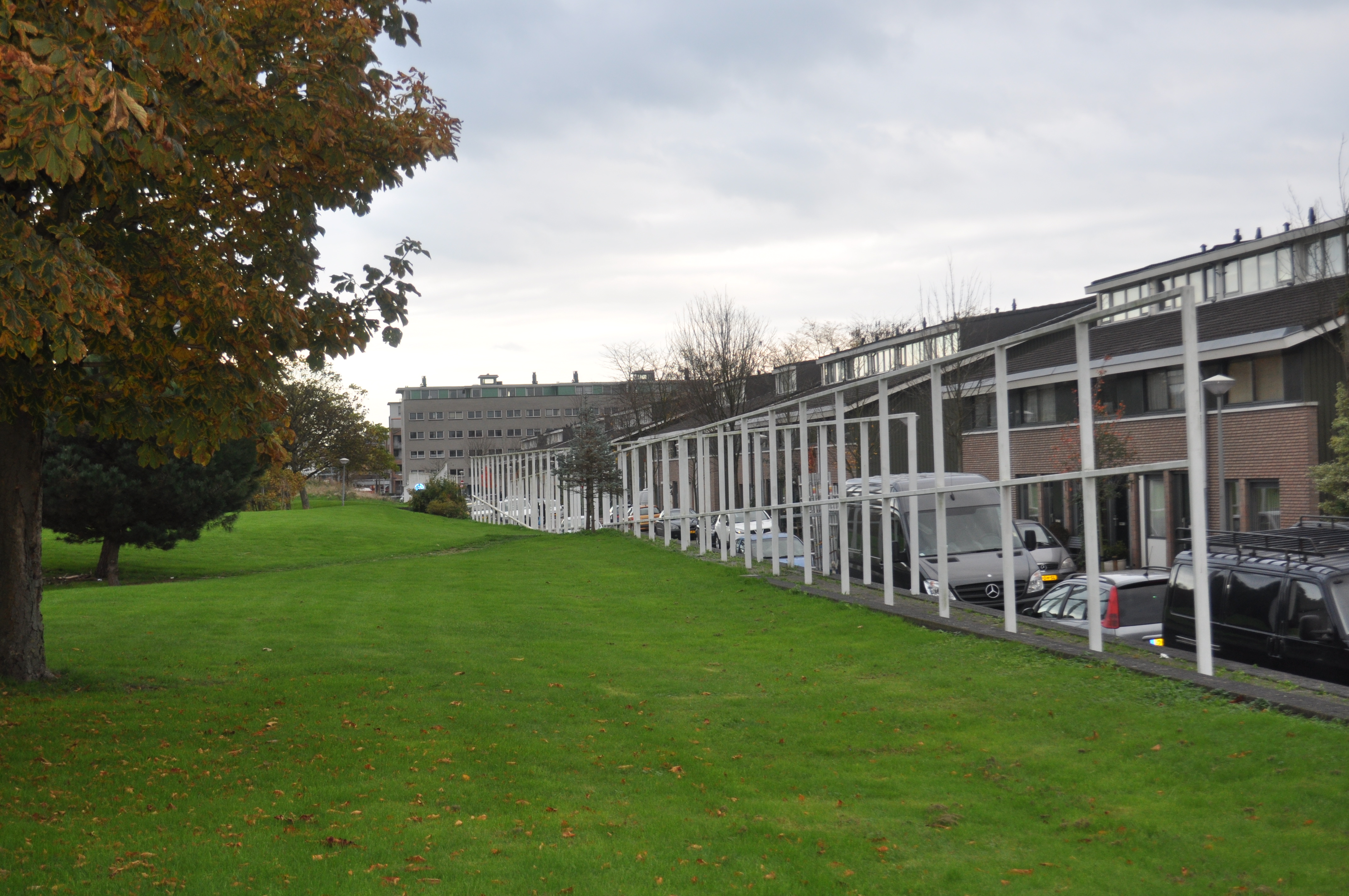 Lamellenhek , van Rik van Dolderen, Kasterleepark, Herentalsstraat